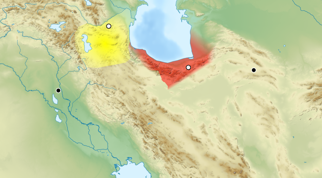 نقشه‌ای تقریبی از مناطق تحت تأثیر قیام خرمدینان و سرخ‌علمان توسط بابک و مازیار در آذربایجان و طبرستان مازِرونی: اتی نقشه که جائونی که مازیار ِسرخ‌علمون و بابک ِخرمدینون ِقیام هاپستنه ره سِراق دنه. سرخ تبرستون و زرد آذربایجون ره میّن کانده